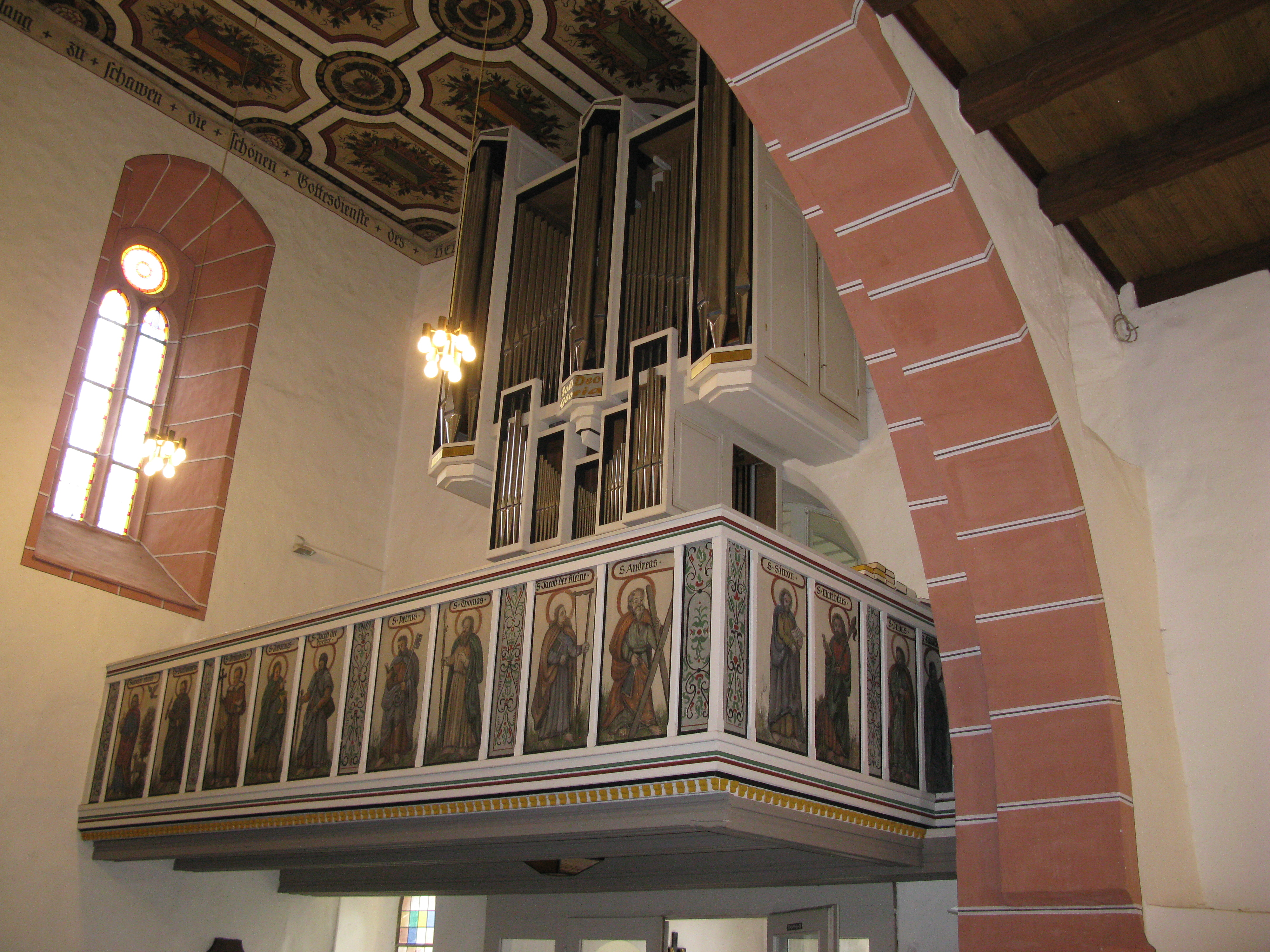 Orgelempore in der Pfarrkirche St. Veit in Wünschendorf/Elster (Ortsteil Veitsberg)